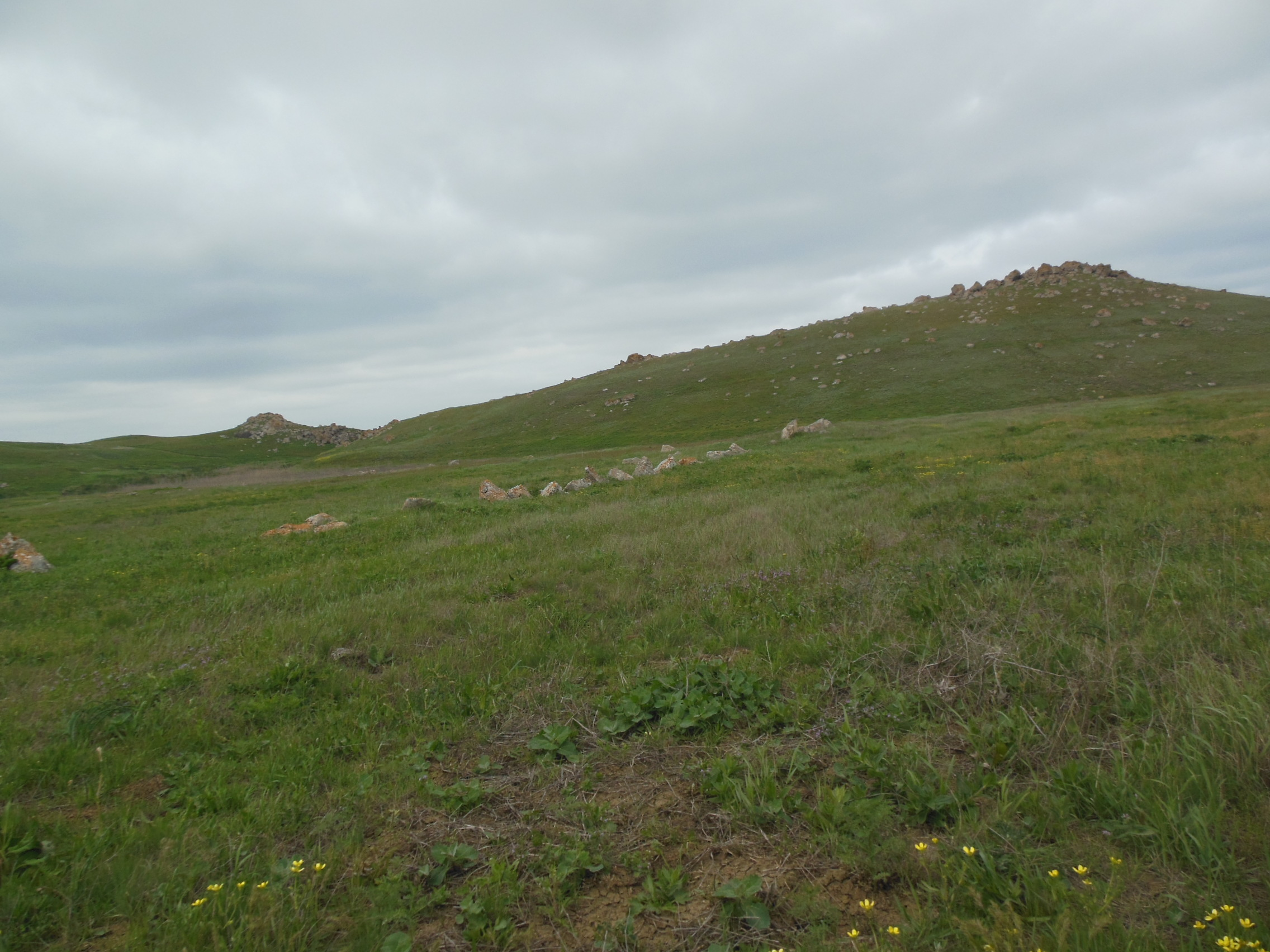 Остатки села Старожилово, Ленинский район, Крым